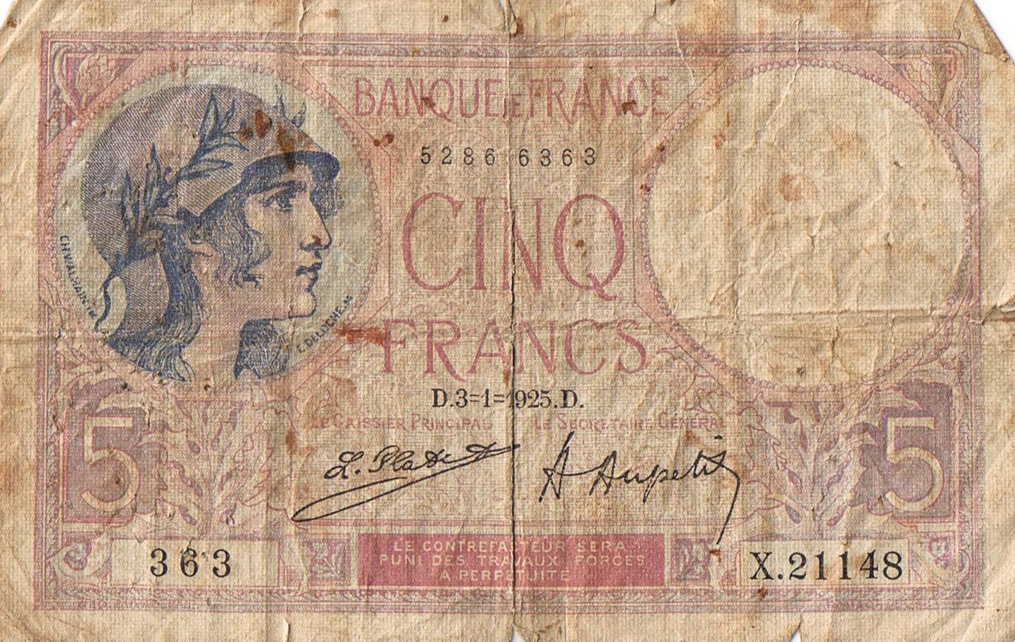 5 Francos, 1925